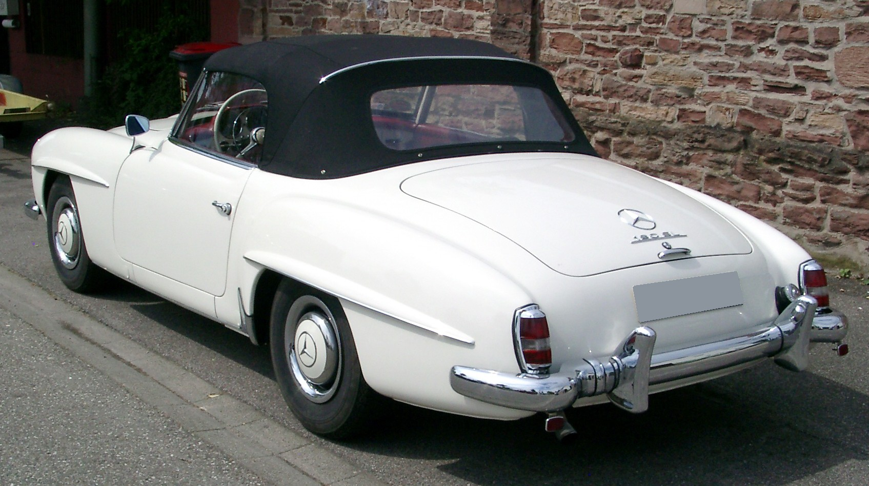 Mercedes-Benz 190 SL (W 121 BII)